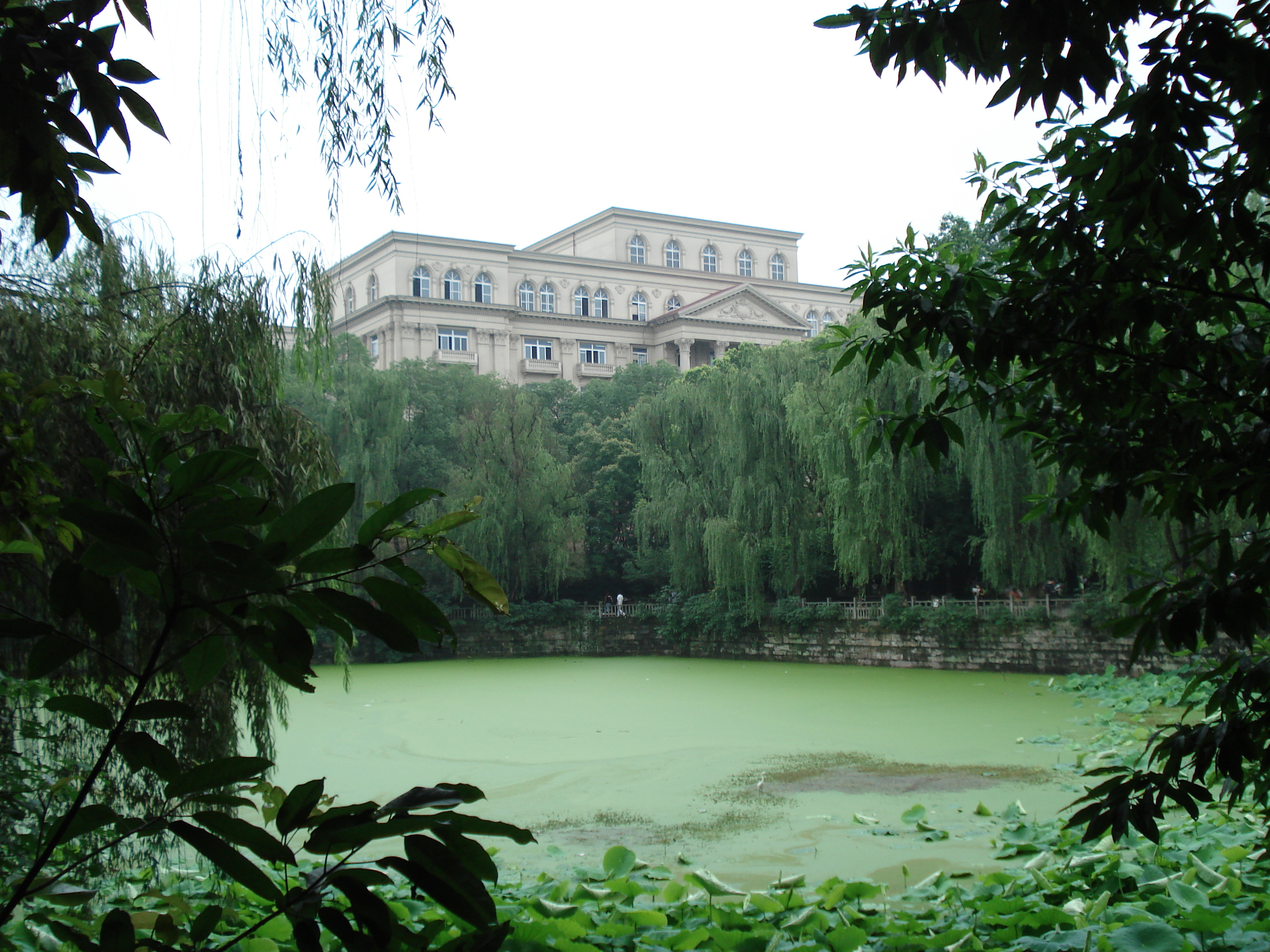 西南大學南區第三十三教學樓